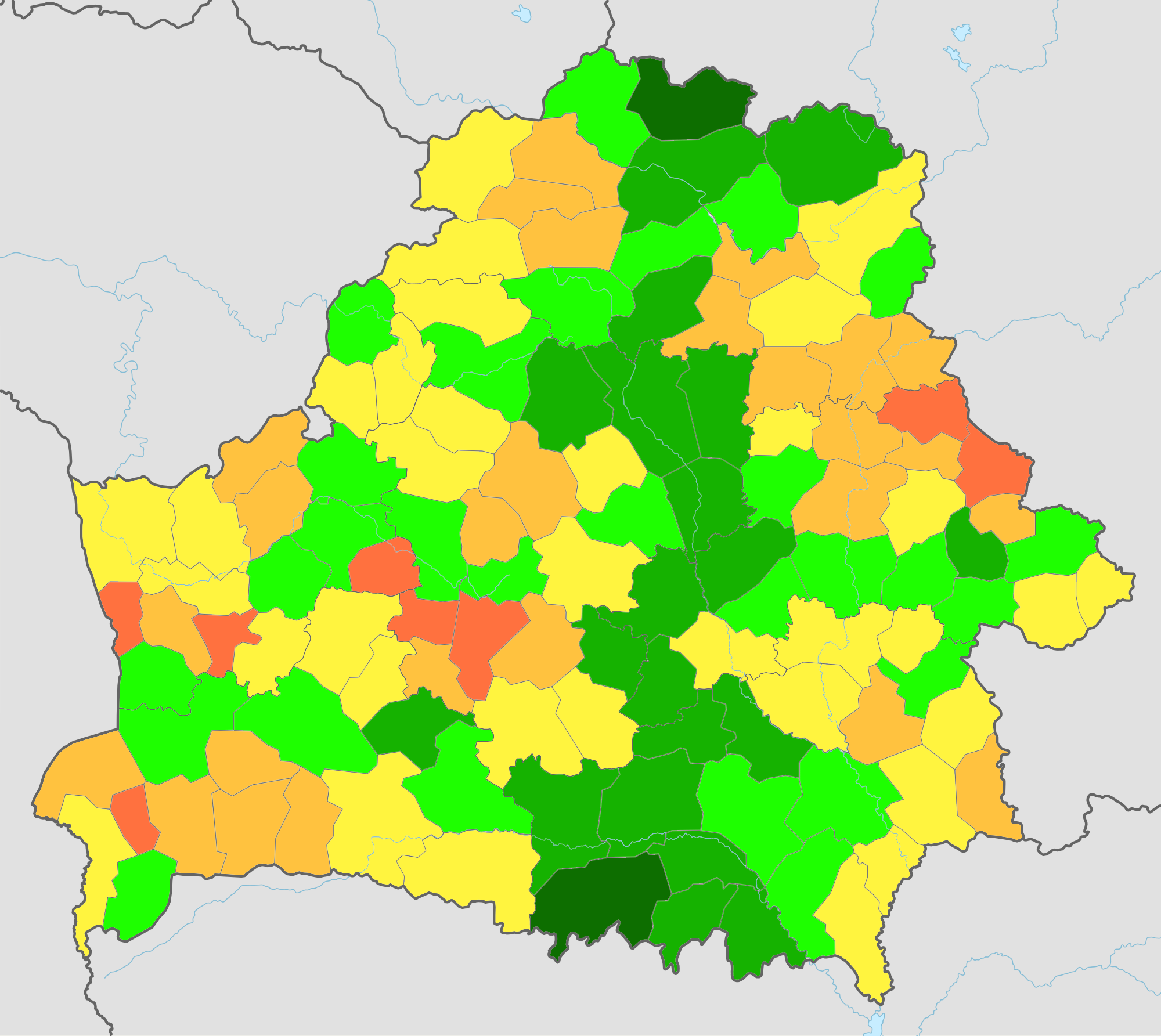 Процент площади районов Беларуси, занятный лесами